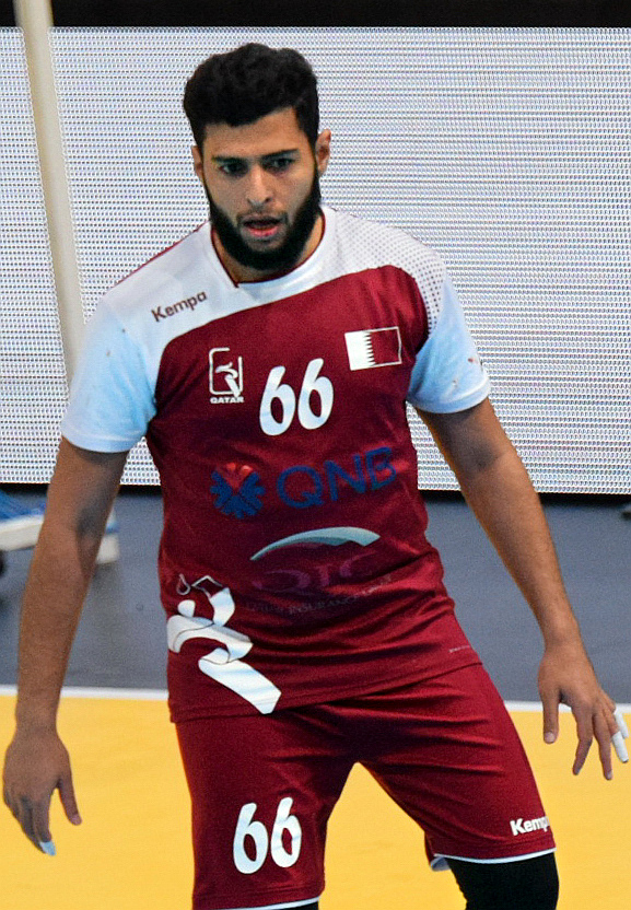 Le 10 janvier 2016 lors du match Norvège / Qatar durant la Golden League à l'AccordHotel Arena (Paris). Hamad Madadi